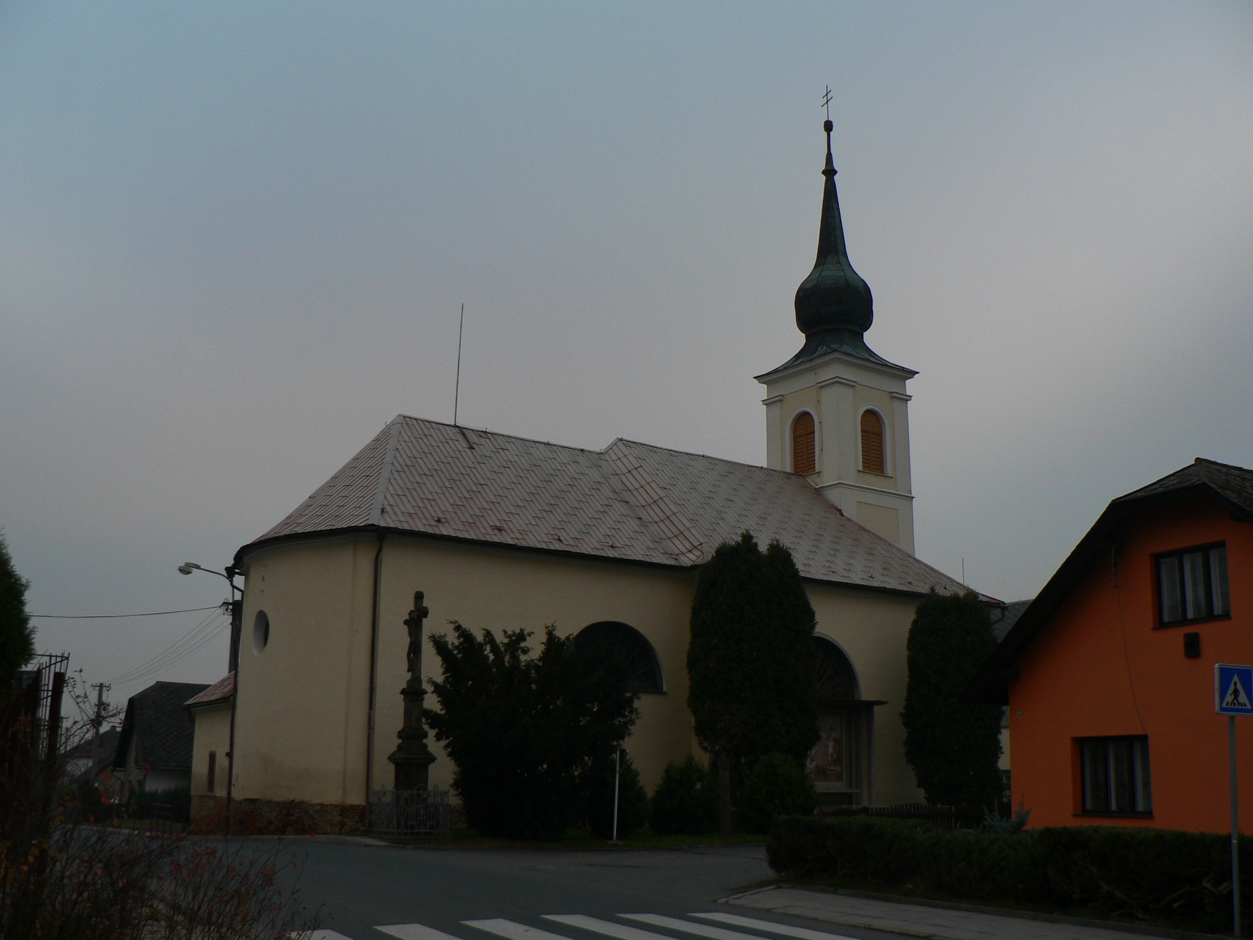 Kostel svatého Linharta (Dolní Studénky)